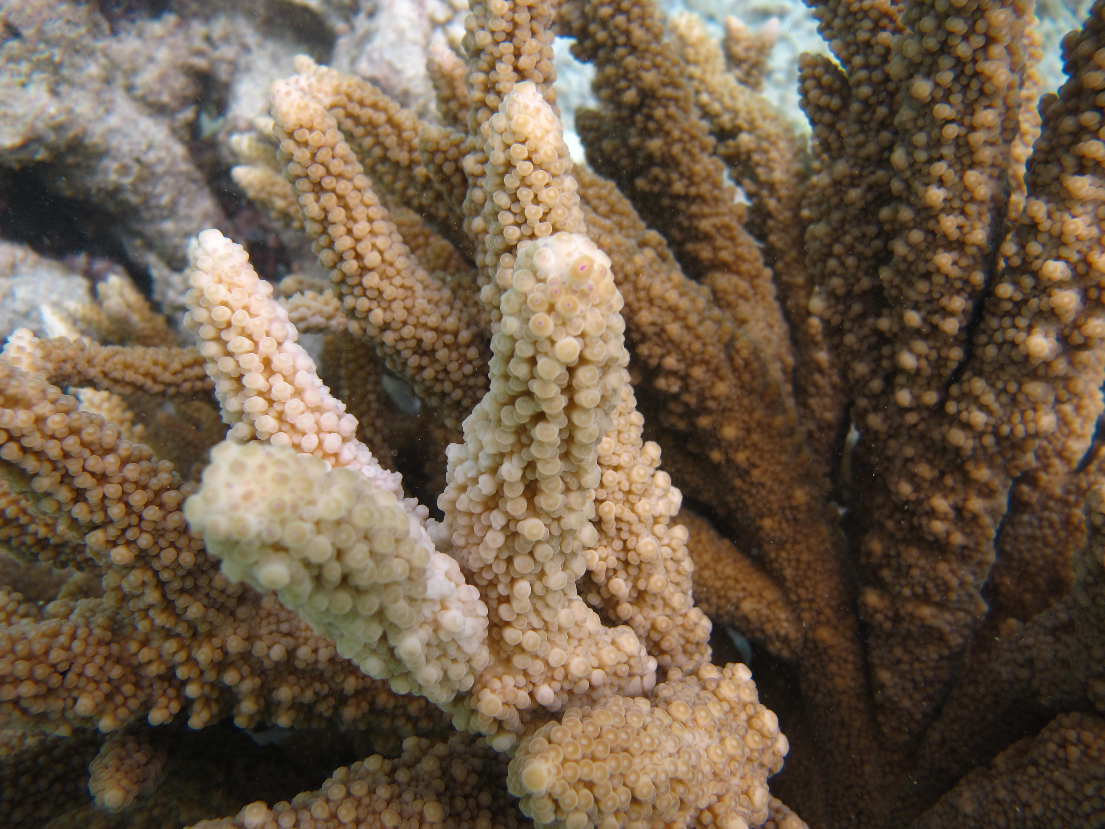 Gros plan sur du corail Acropora hemprichii aux Maldives (atoll de Baa).